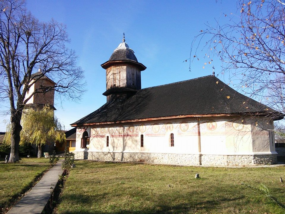 Ansamblul bisericii „Sf. Nicolae”-Tabaci